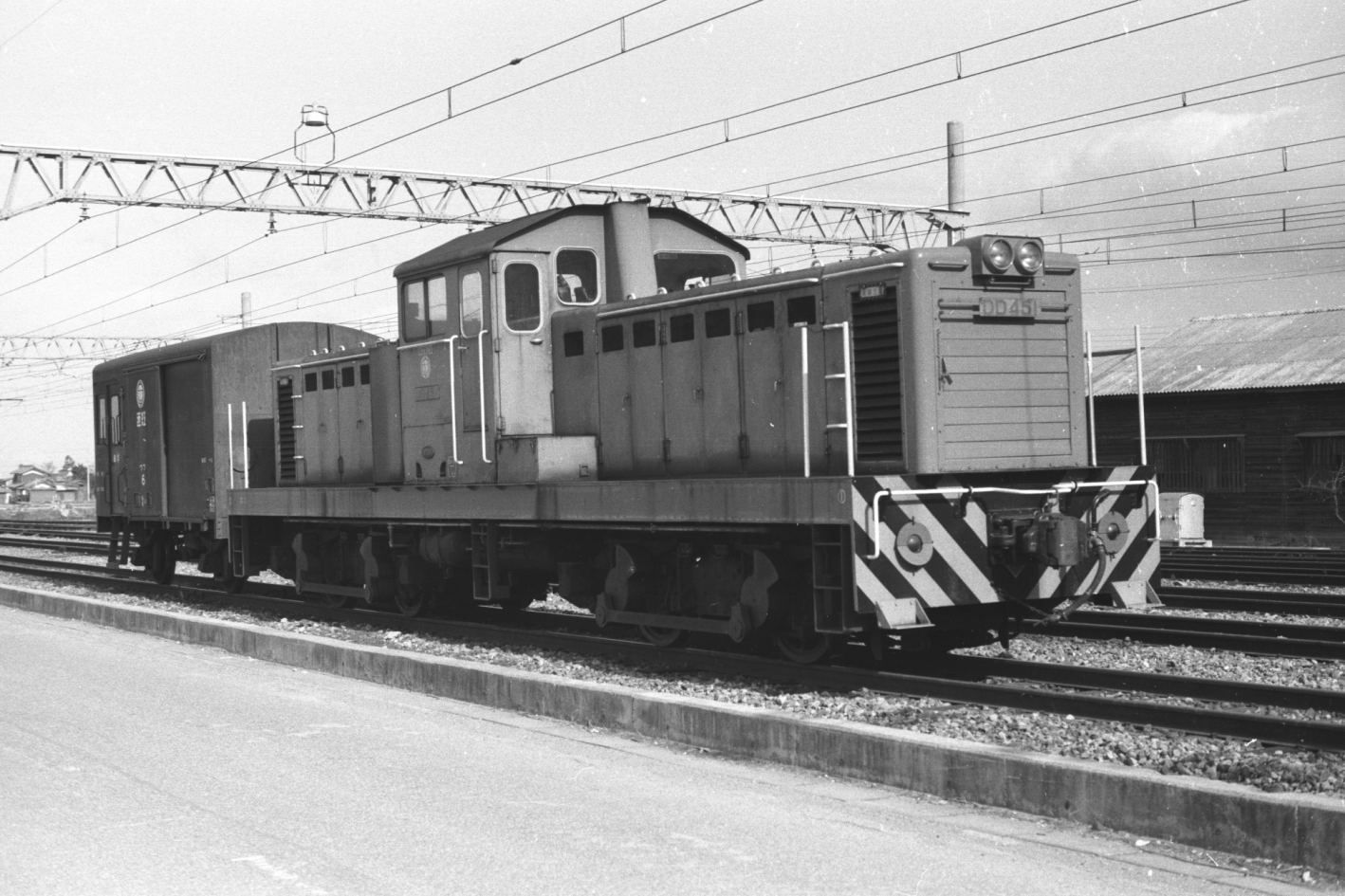 DD45-1,Oumi-Tetudou,Shiga,Japan